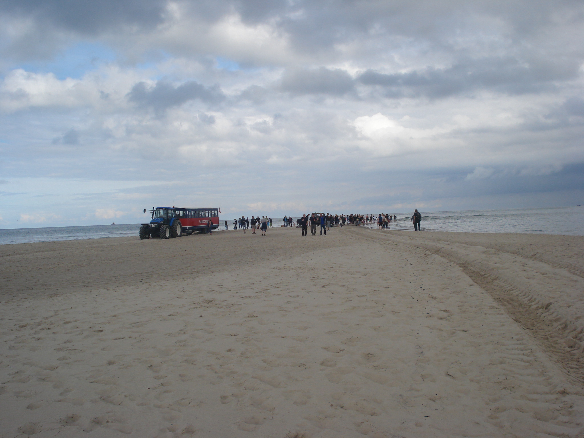 pointe de Grenen au nord du Danemark, point de rencontre de la mer Bltique et de la mer du Nord